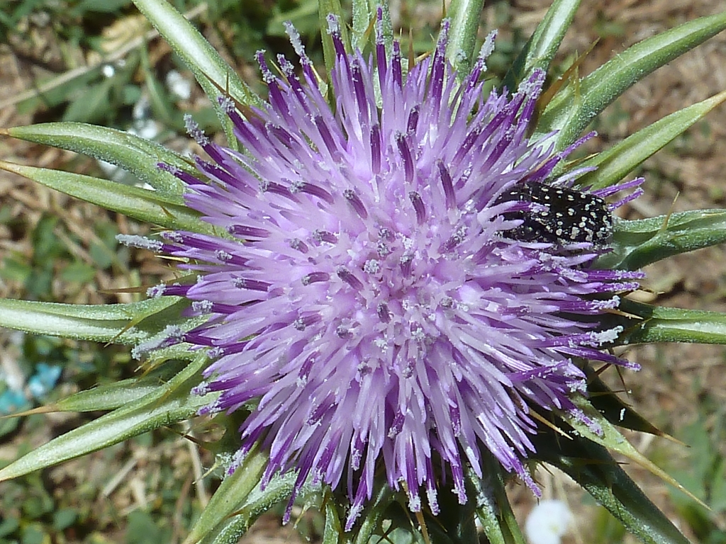 Silybum marianum (Cardo María): Capítulo, vista cenital con Oxythyrea funesta - Camino de la Azarbe de Patricio, Albatera (Alicante, España).